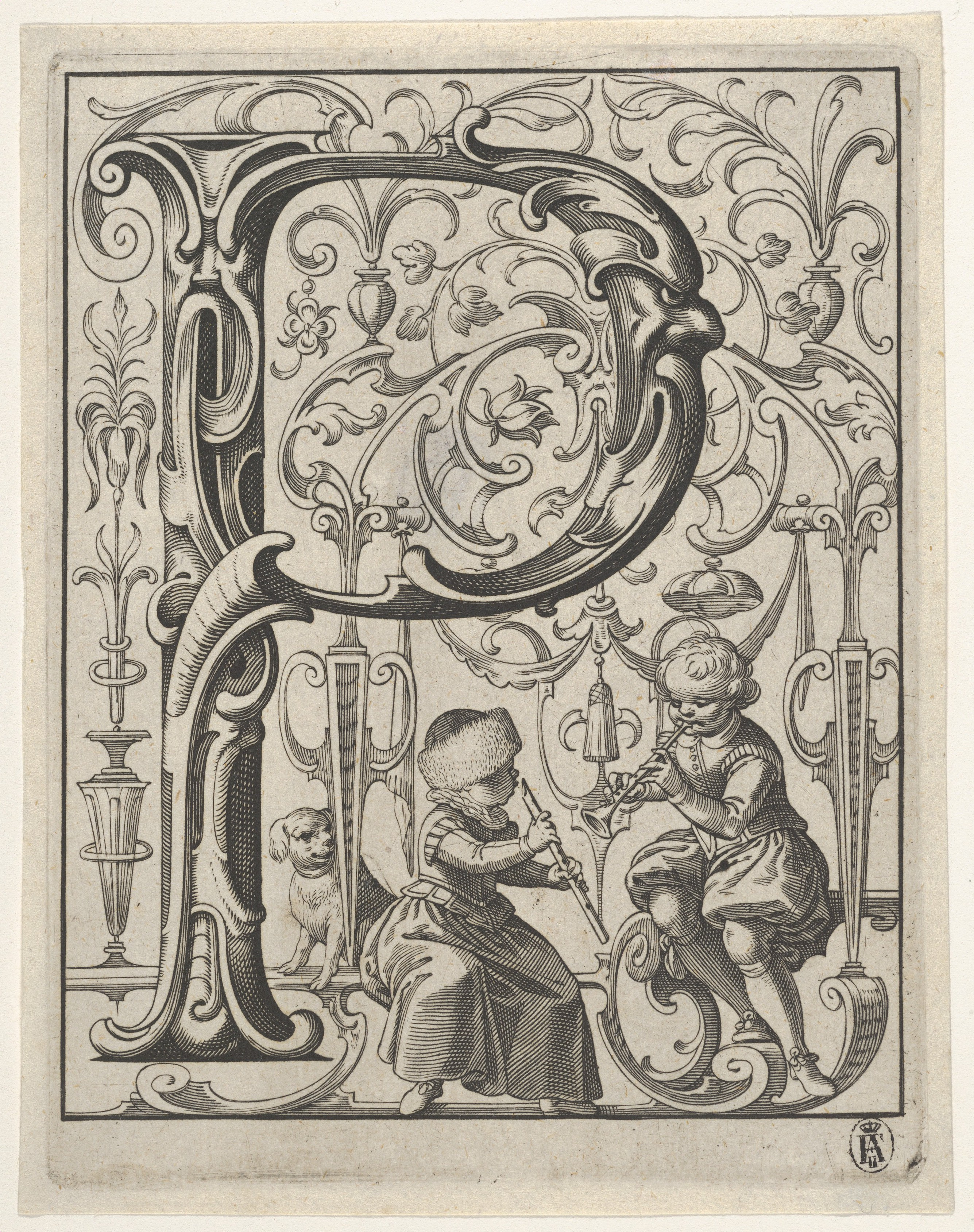 Book; Books